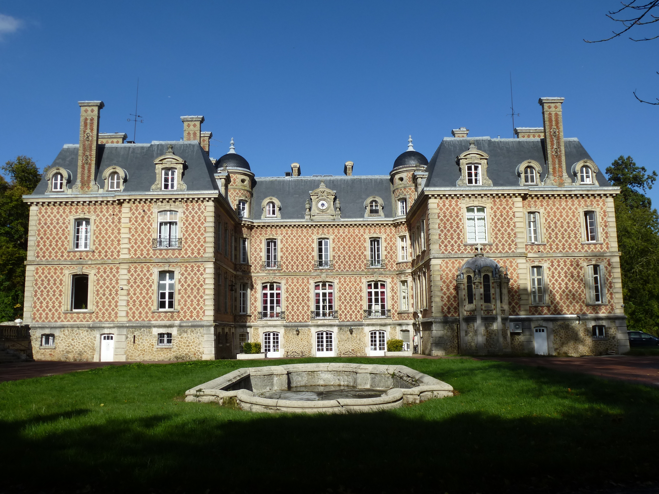 Château de Pérreuse, Jouarre. (Seine-et-Marne, région Île-de-France).